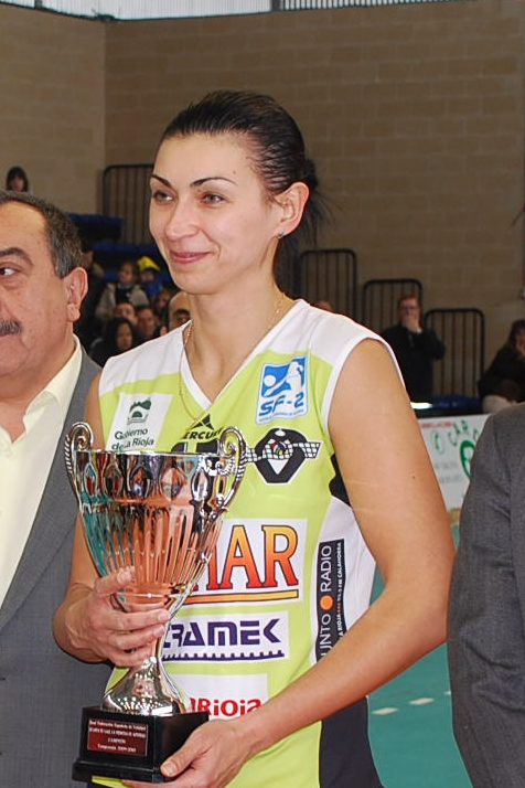 Oksana Zaporozhets con la Copa de La Princesa 2010